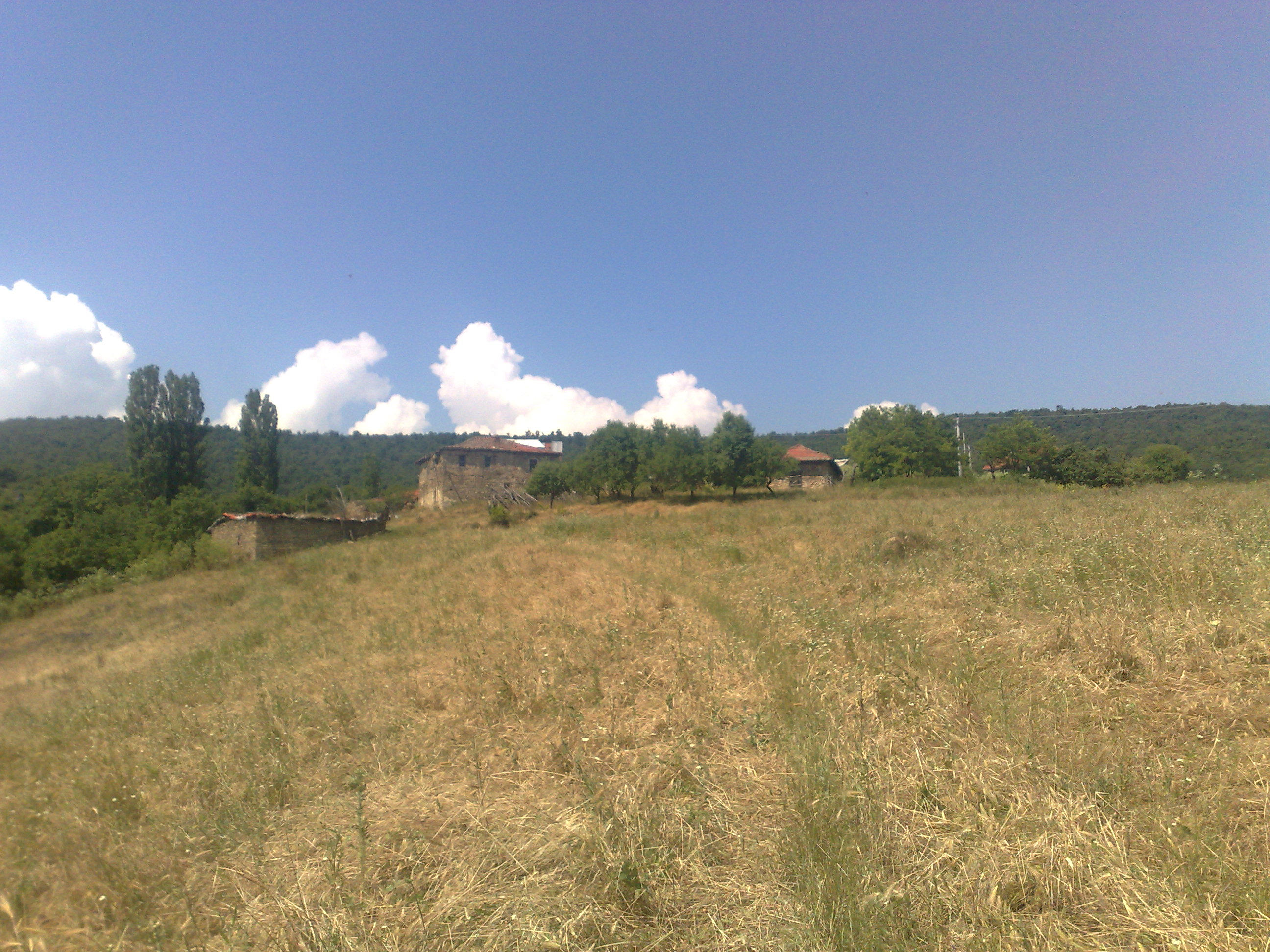 Влезот на Карабуниште од западната страна